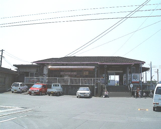 三ヶ日駅天竜浜名湖鉄道 三ヶ日駅 駅舎 撮影当時は引佐郡三ヶ日町